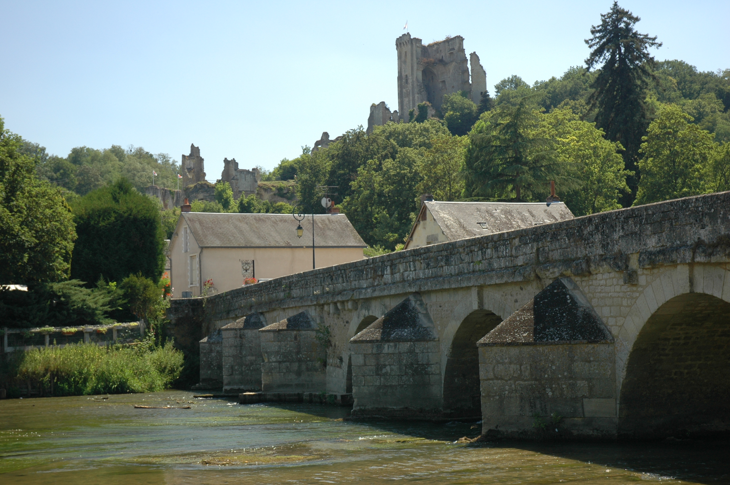 Pont sur le Loir à Lavardin (Loir-et-Cher, France) .